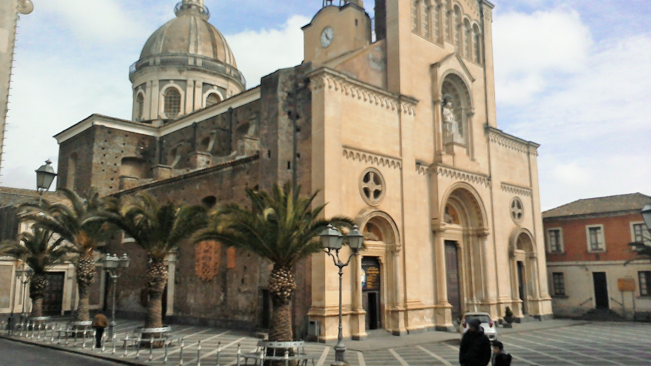 Chiesa della Madonna delle Grazie - Misterbianco, vista dal lato est.